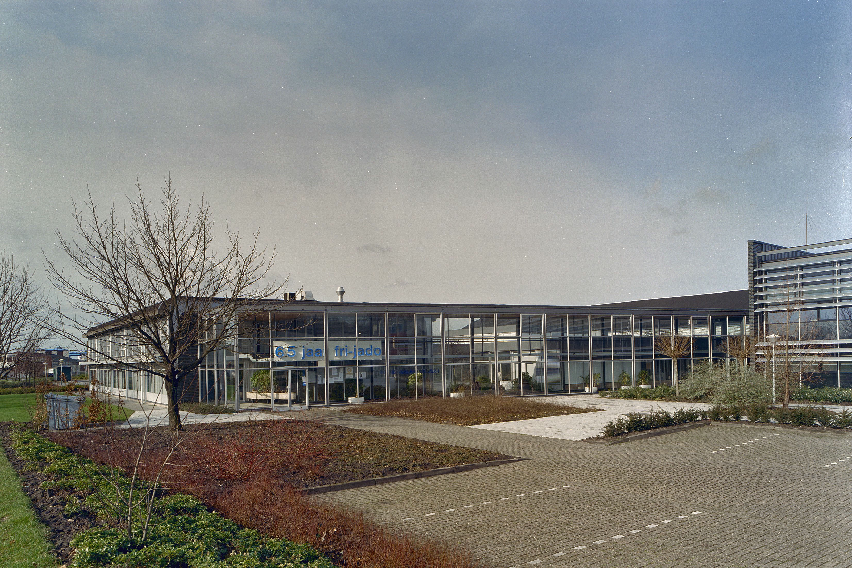 Voormalige Tomadofabriek, Thans Fri-Jado: Overzicht kantine met glazen luifel (opmerking: Gefotografeerd voor Toonbeelden van de Wederopbouw). "65 jaar fri-jado"